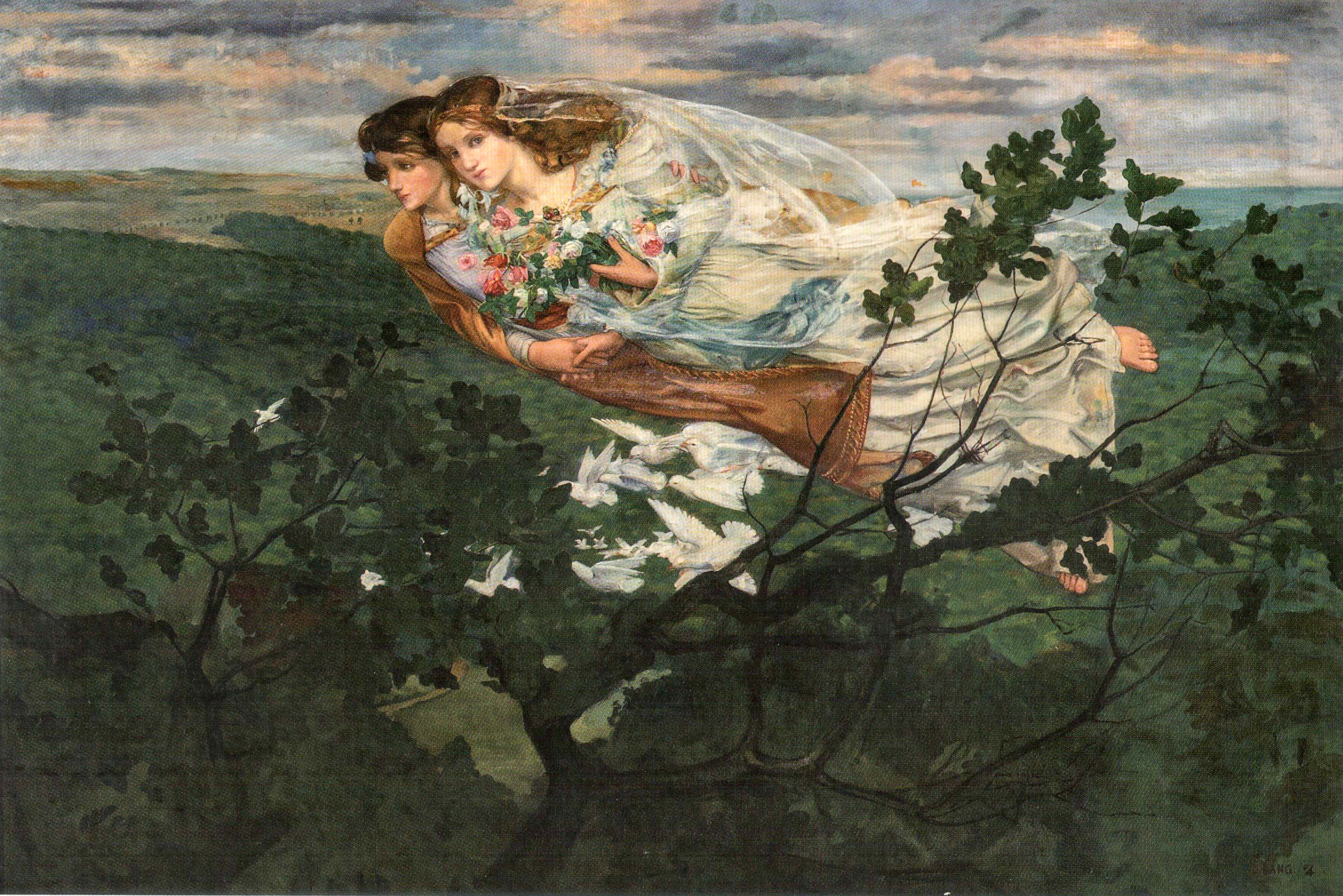 Dominique Lang: Messagères du printemps.